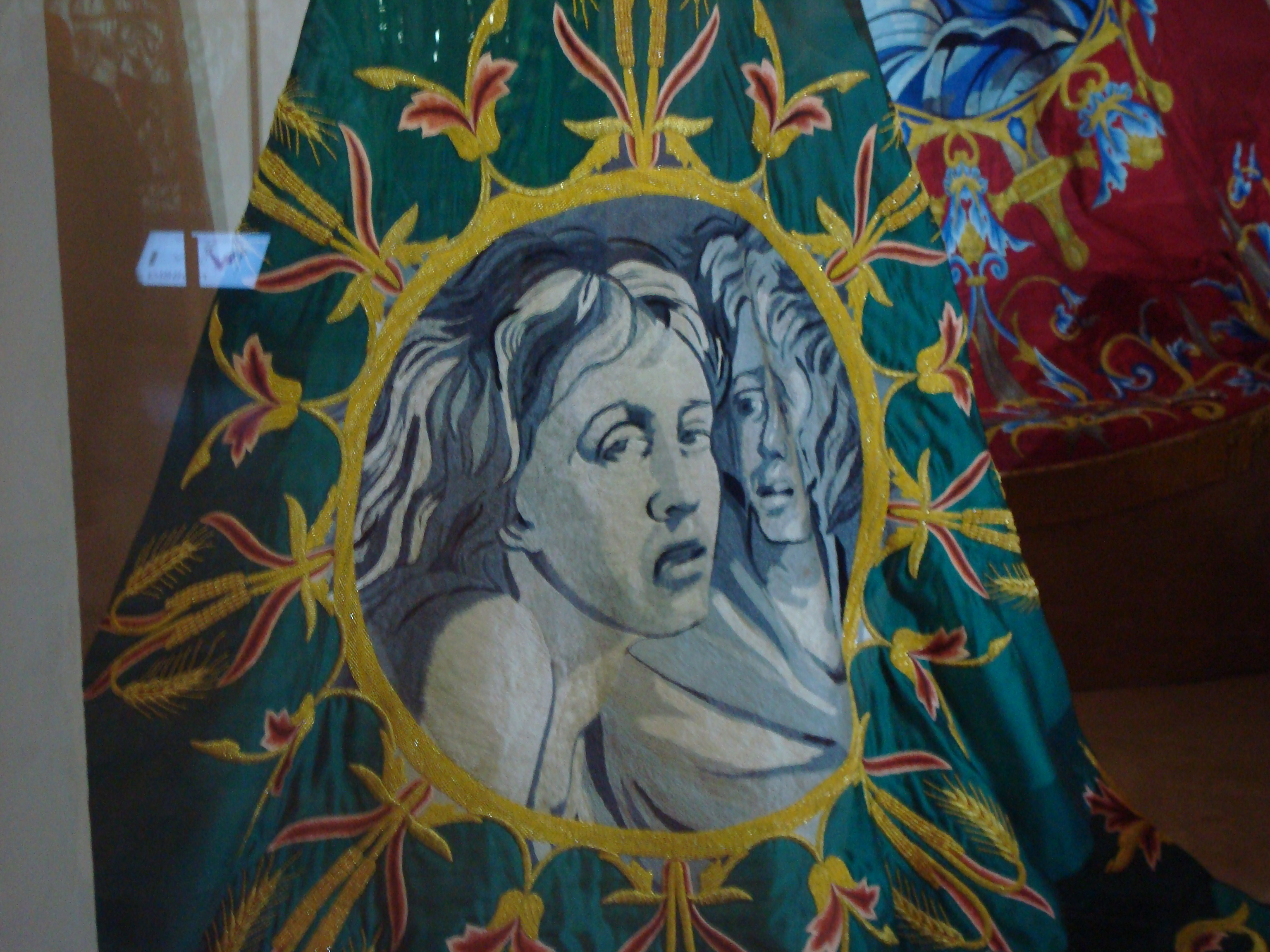 Manto de uno de los cuatro jinetes del apocalipsis que desfilan en el cortejo blanco, la peste, Semana Santa de Lorca